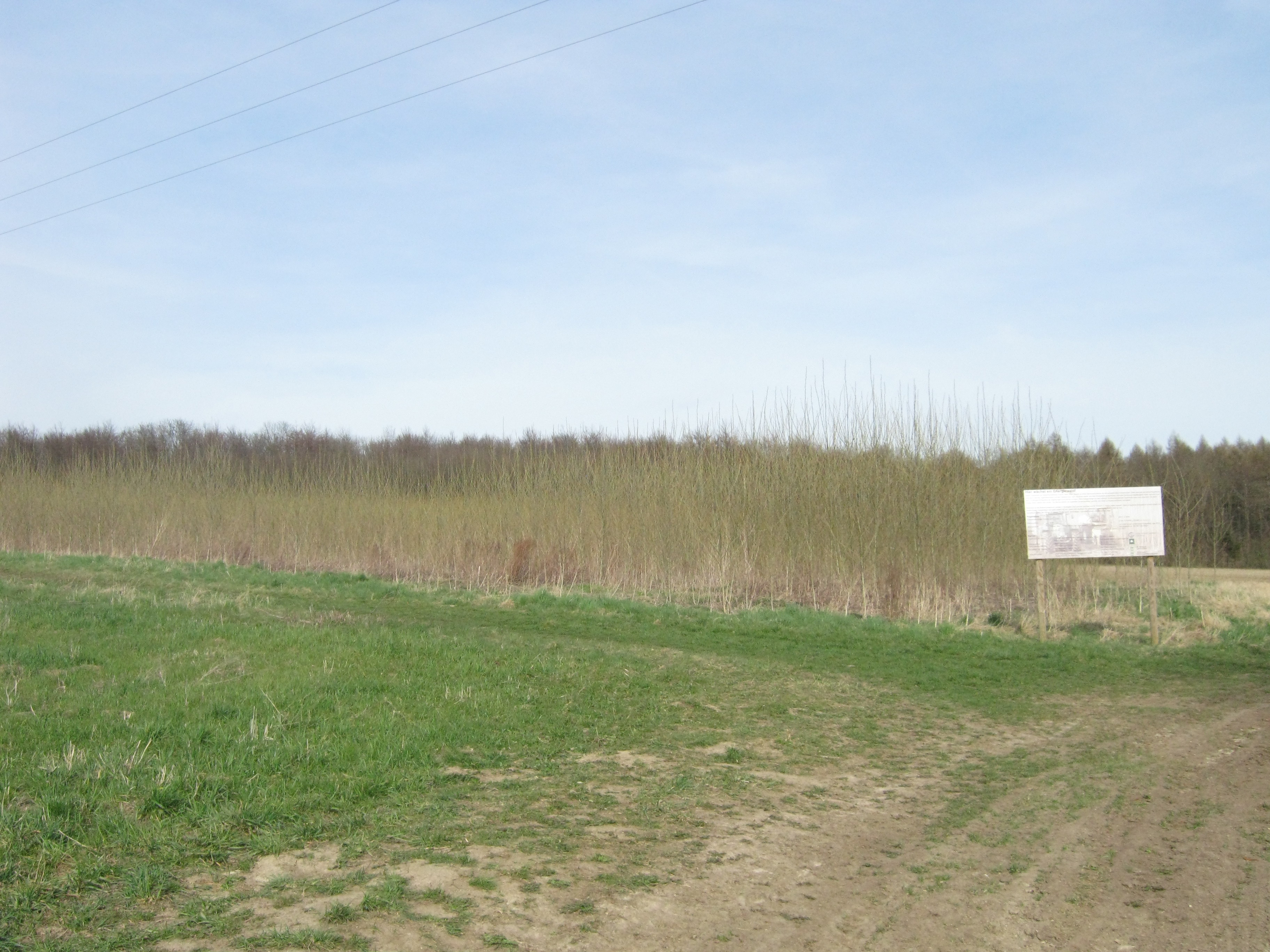 Energiewald der Universität Göttingen am nordöstlichen Ortsrand von Deppoldshausen. Der Wald besteht aus schnellwachsenden Pappeln und dient der Produktion von Holzschnitzeln als Biomasse für das Bioenergiezntrum Leinetal in Hardegsen.